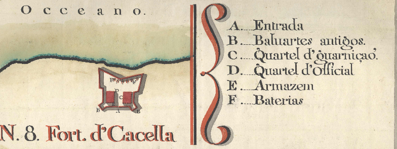 Planta de pormenor do Fortaelza de Cacela Velha, no Algarve, gravura datada de 1784 .